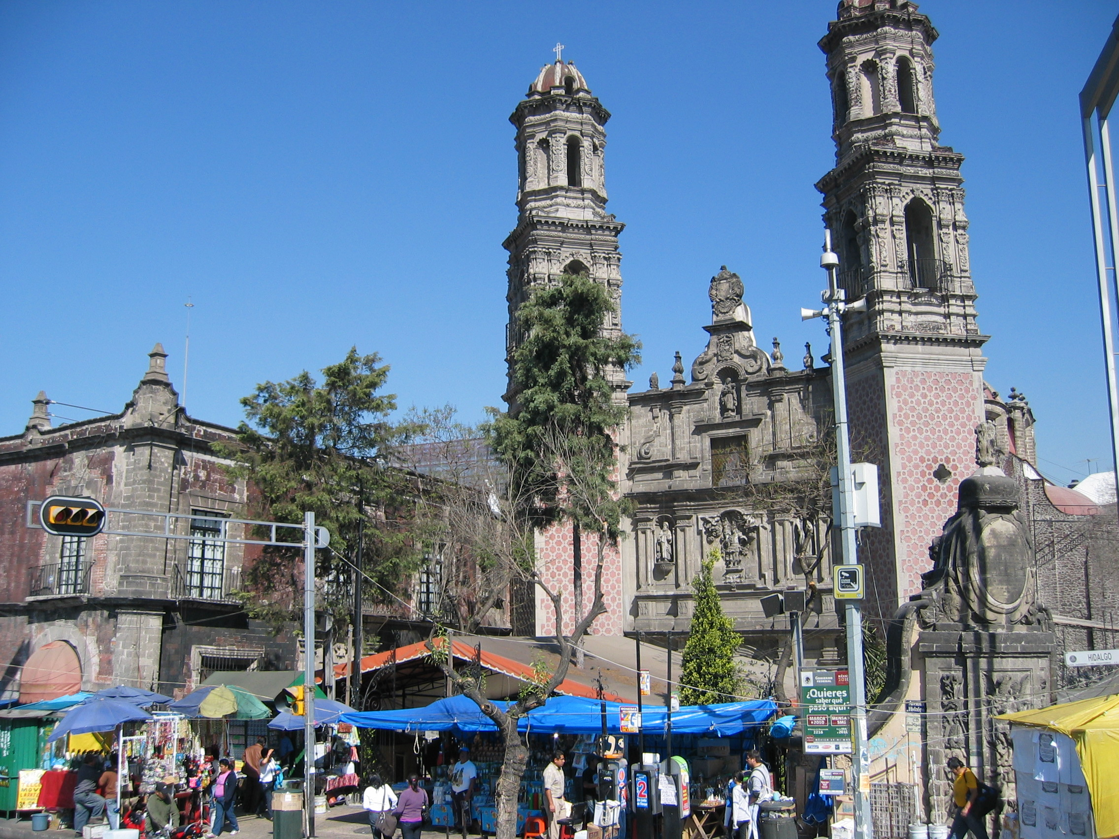 Templo de San Hipólito, mejor conocido como el templo de San Judas Tadeo